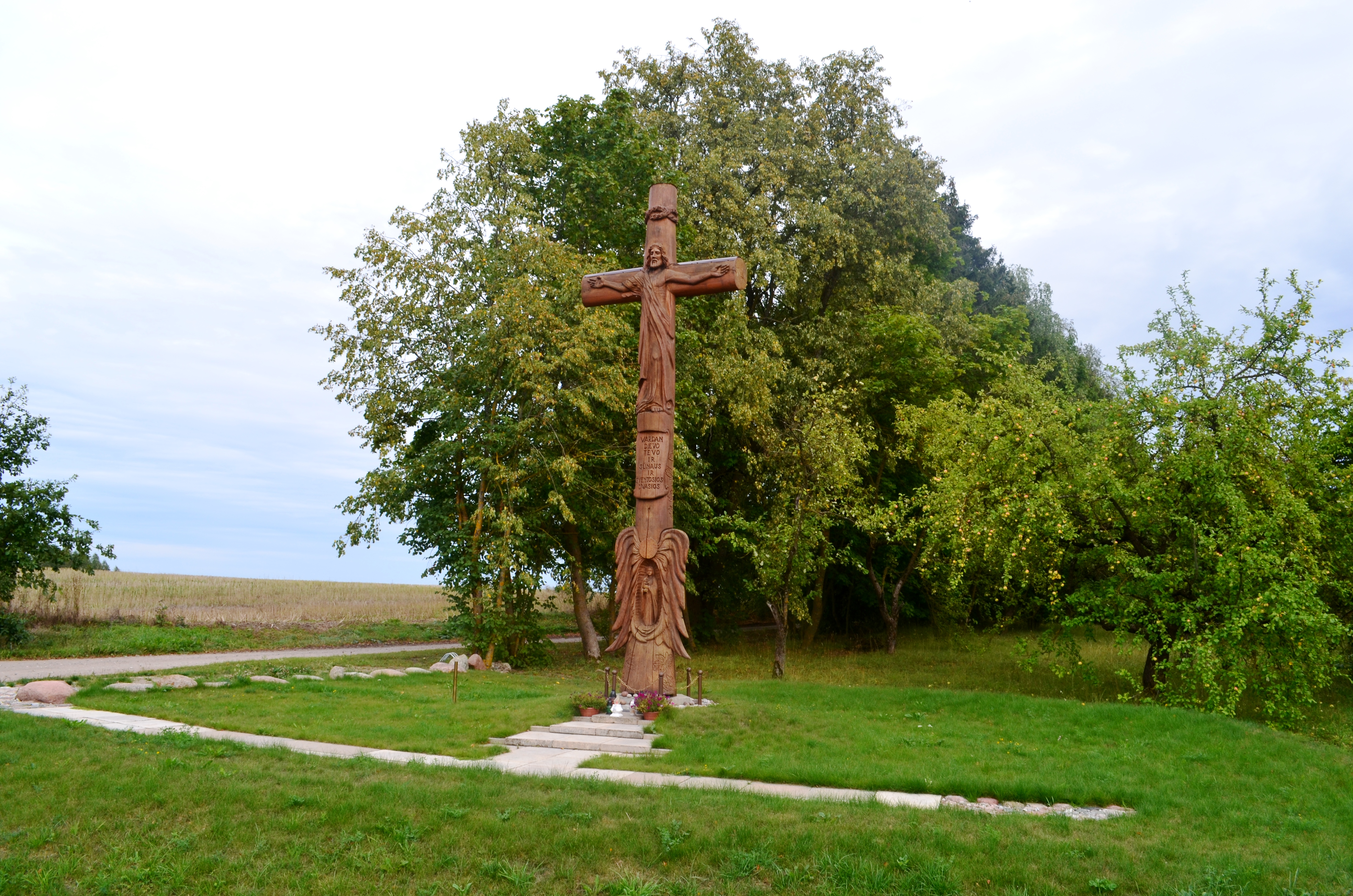 Dubėnai, Alytaus raj.